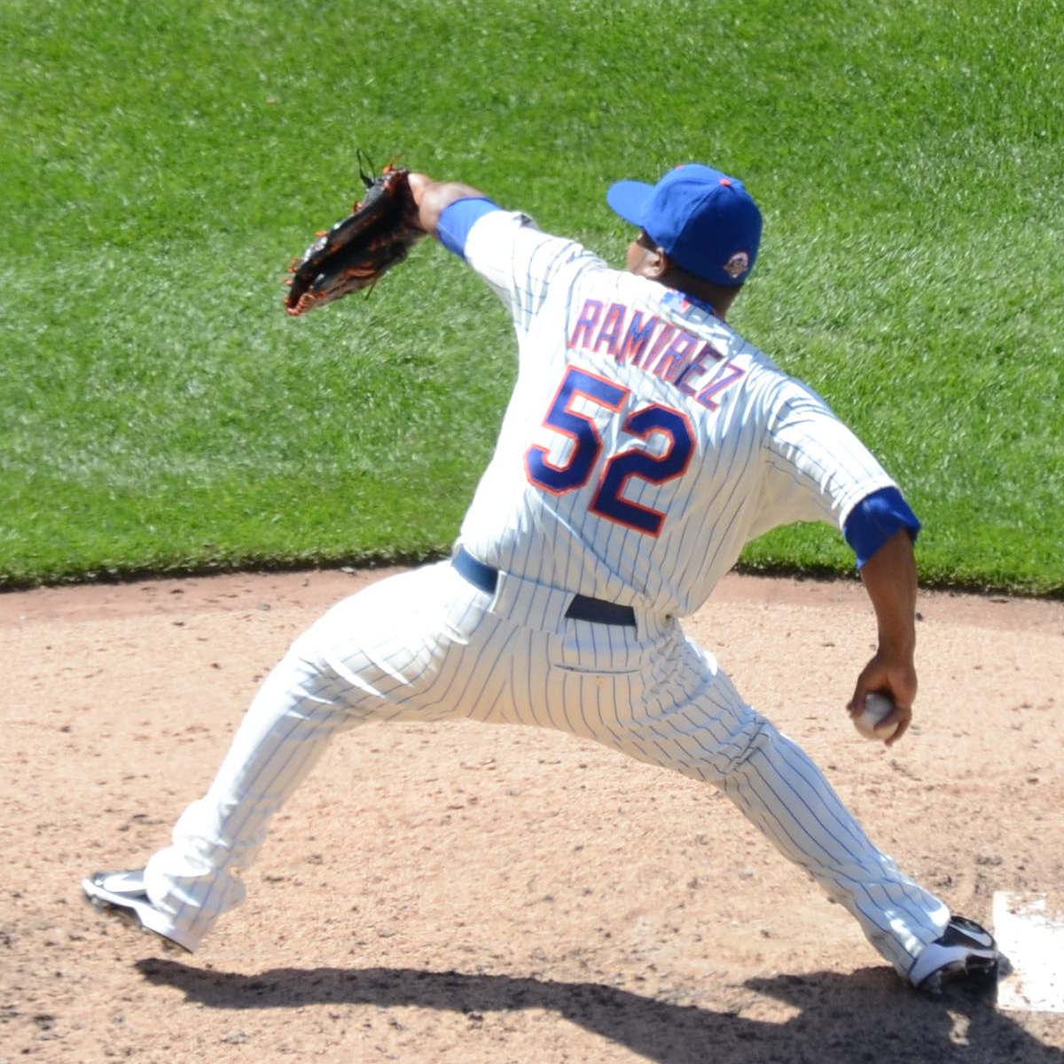 Ramón Ramírez